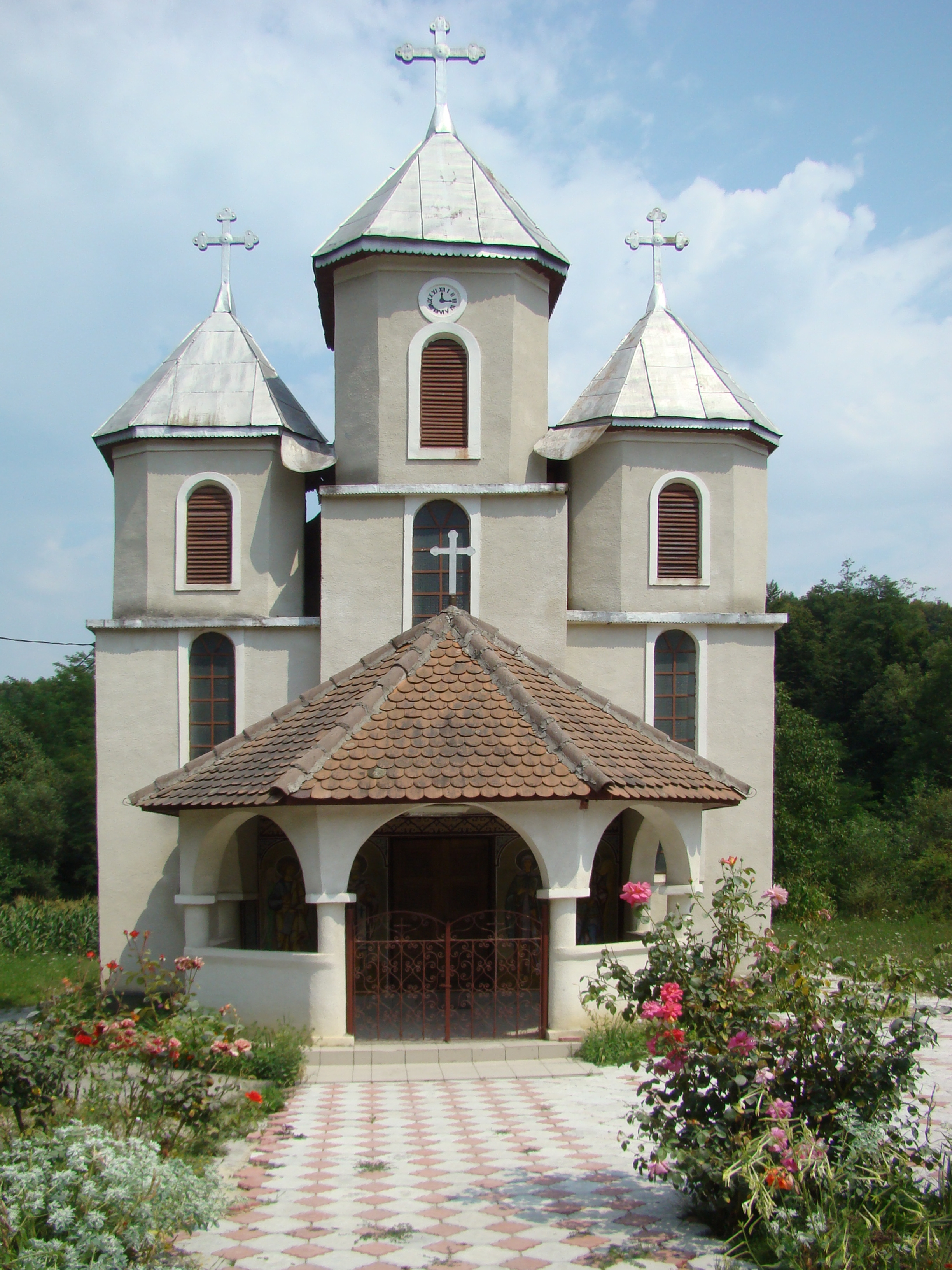 Biserica nouă din Jupânești construită în 1996